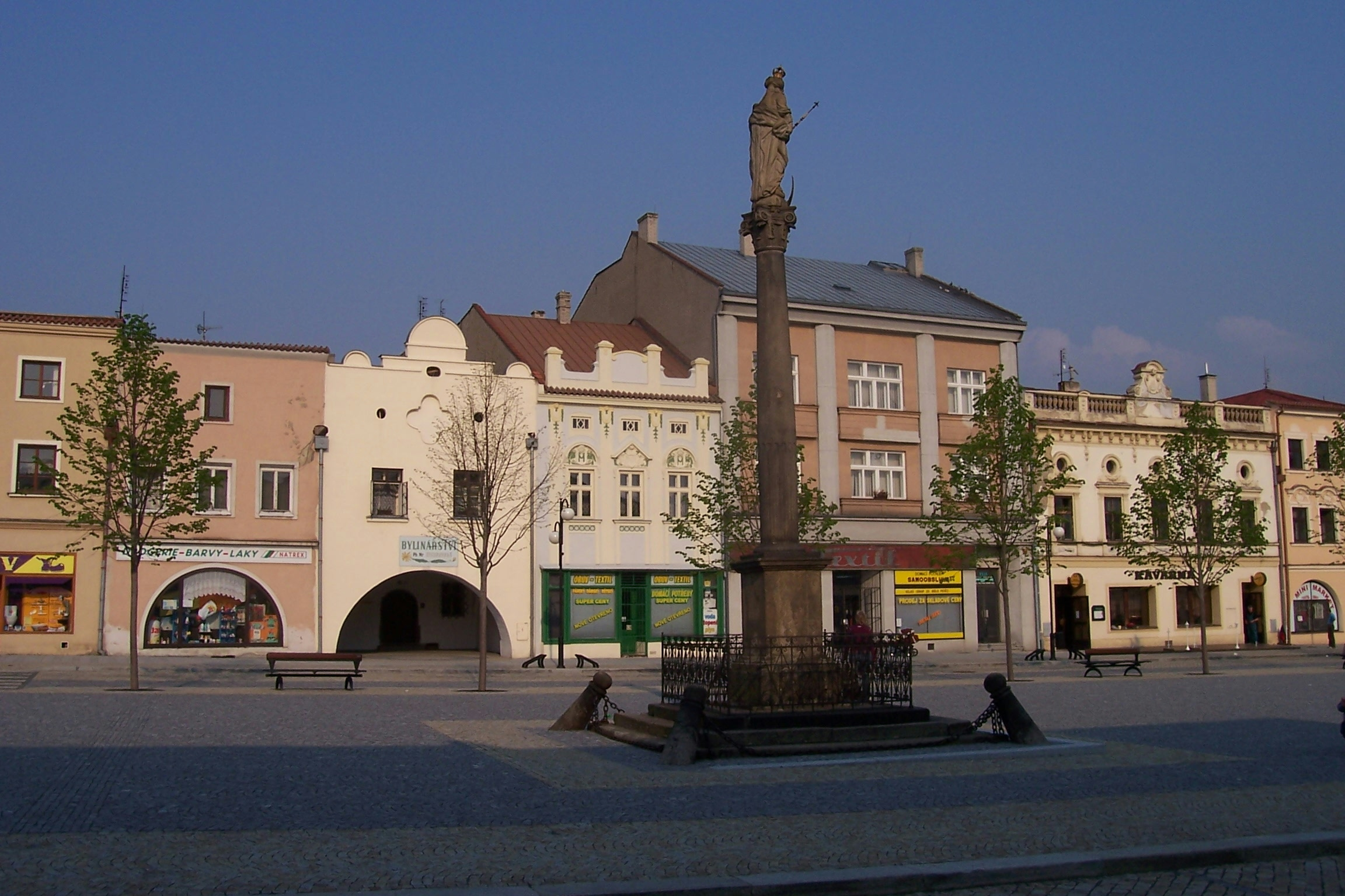 vlastní foto